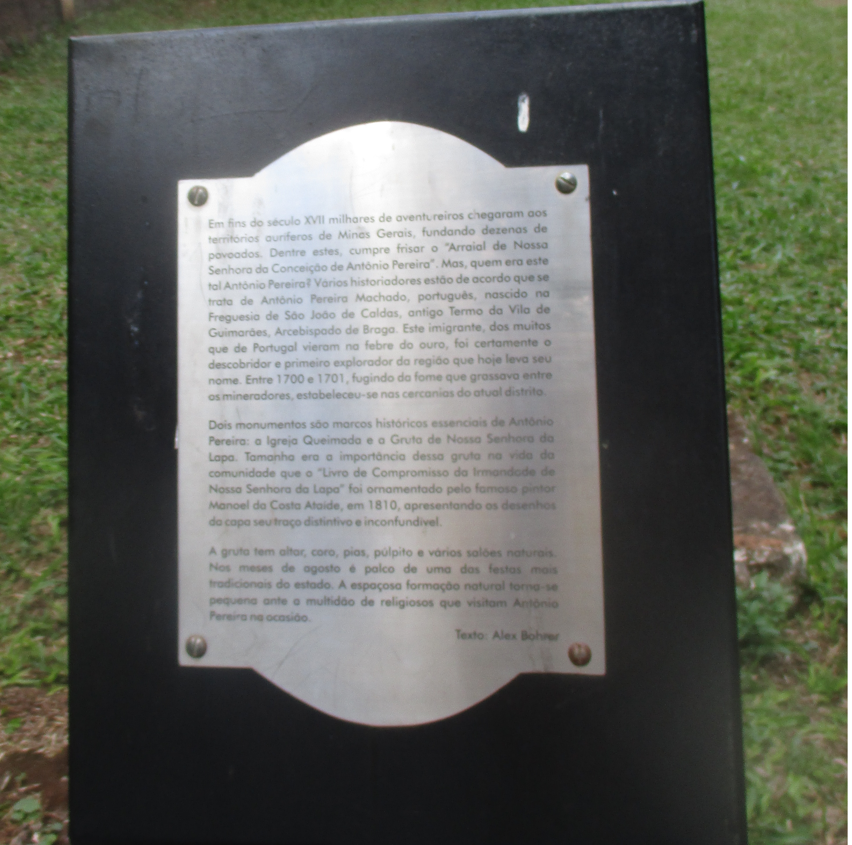 Placa na entrada da gruta da lapa, explicando de forma sucinta a história da gruta.